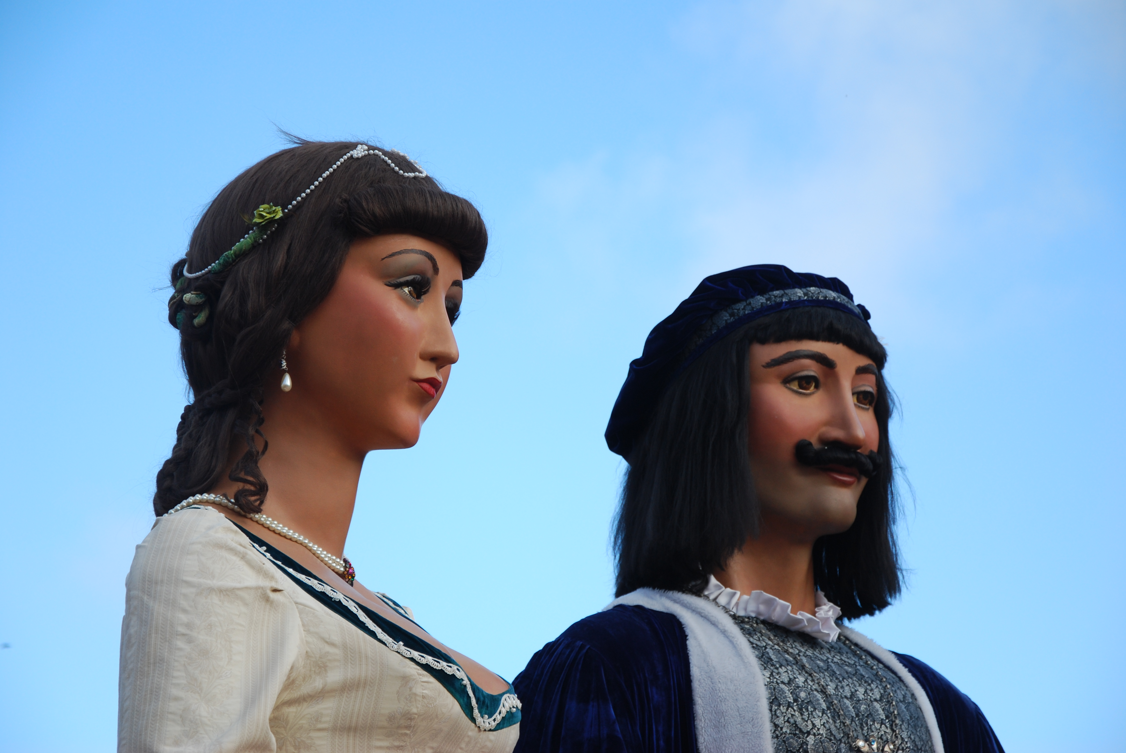 Els gegants centenaris de Badalona, l'Anastasi i na Maria